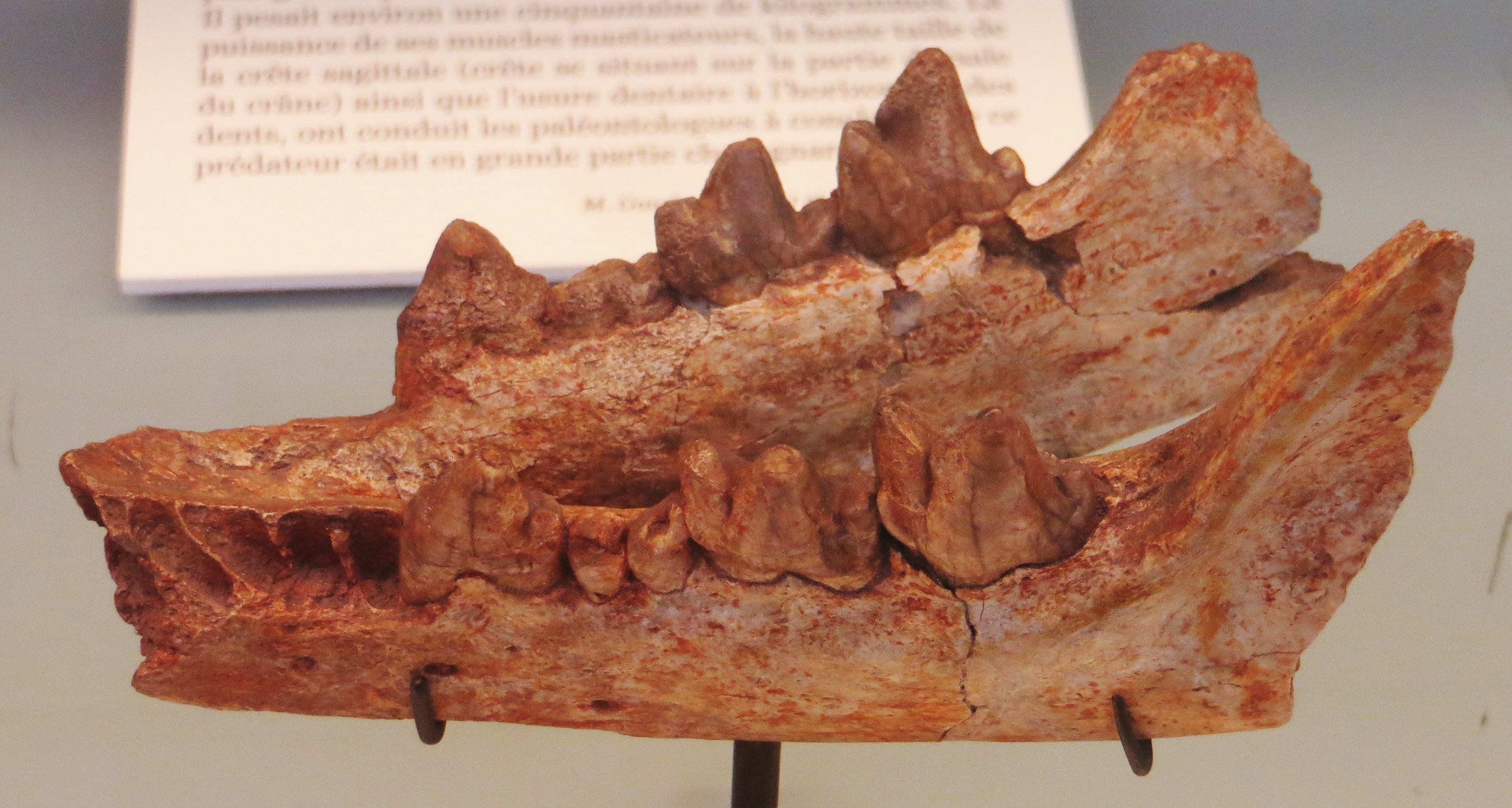 Pterodon fossil mandible